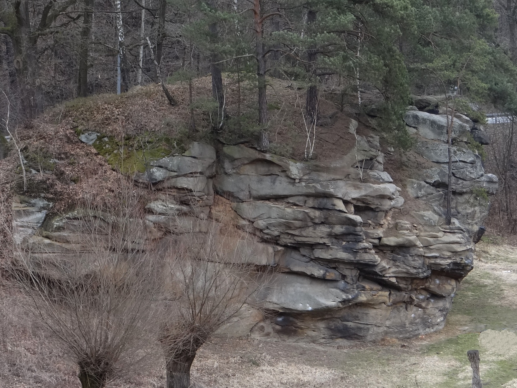 skała "Czarownica" w rezerwacie przyrody "Skamieniałe Miasto" w Ciężkowicach